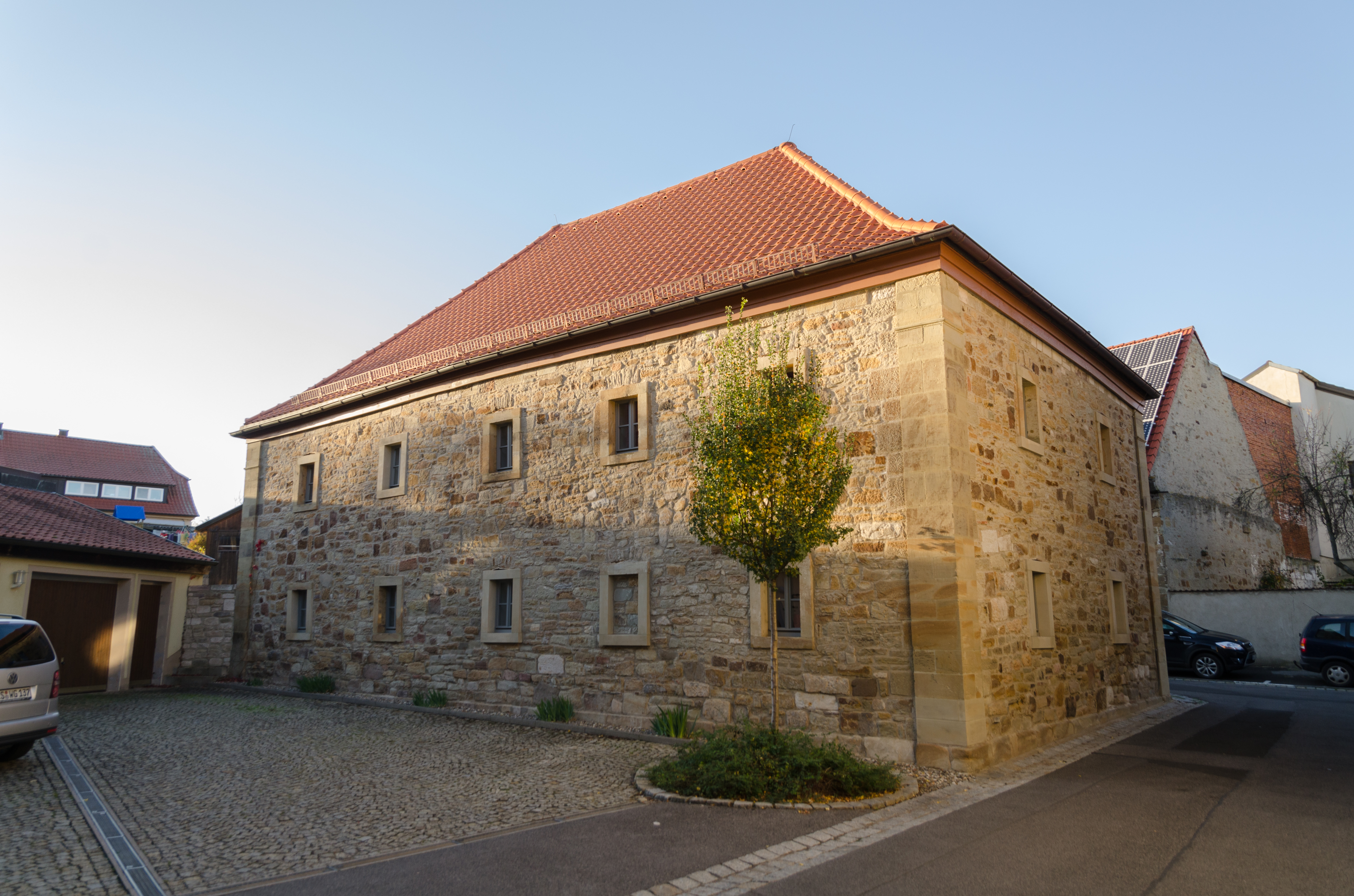 Bad Königshofen im Grabfeld, Elisabethastraße 29